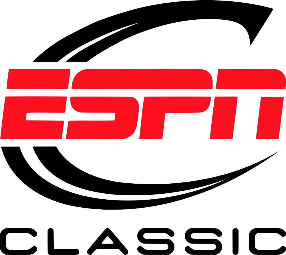 ESPN Classic Logo